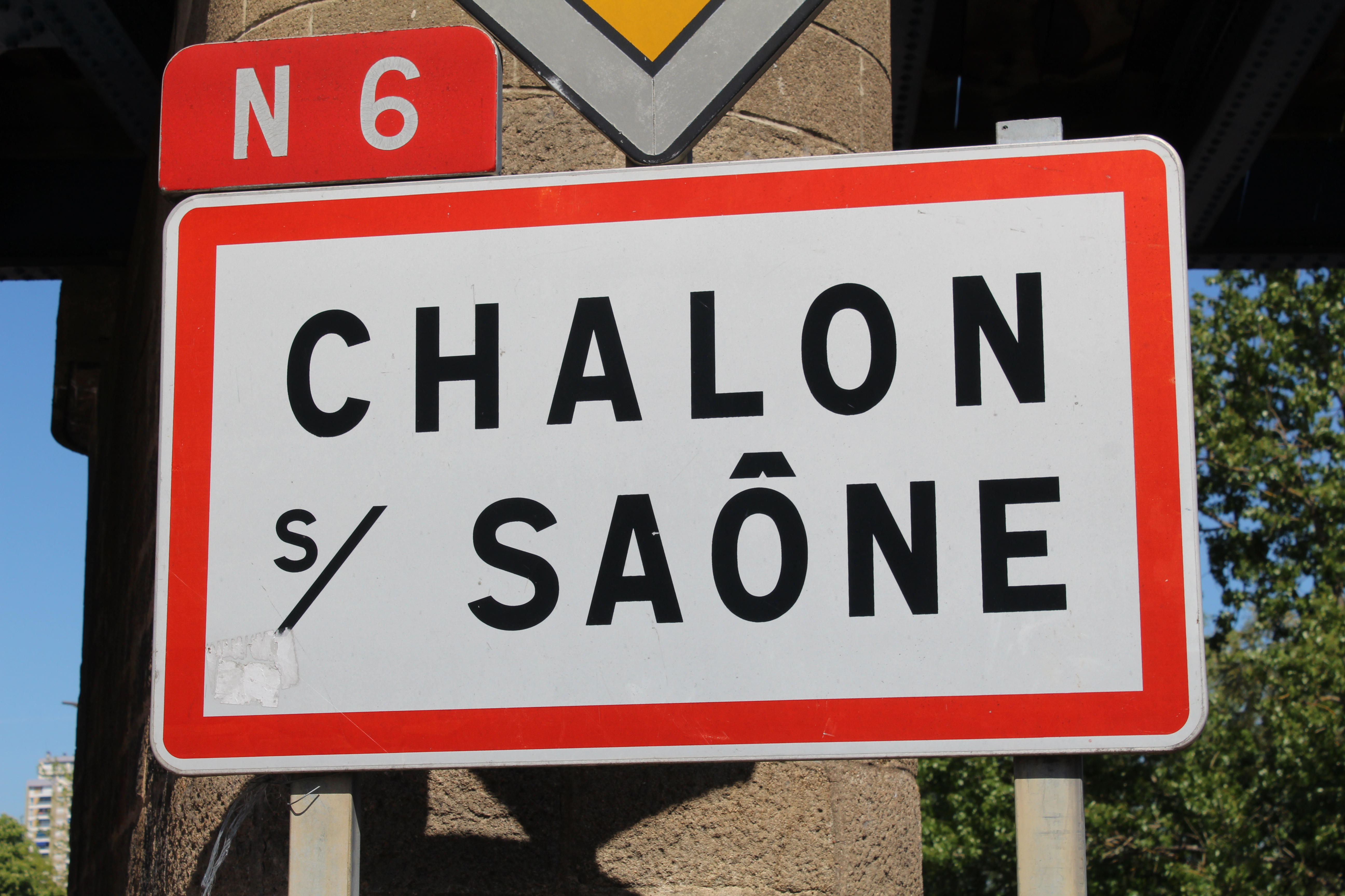 Panneau d'entrée dans Chalon-sur-Saône depuis Mâcon.